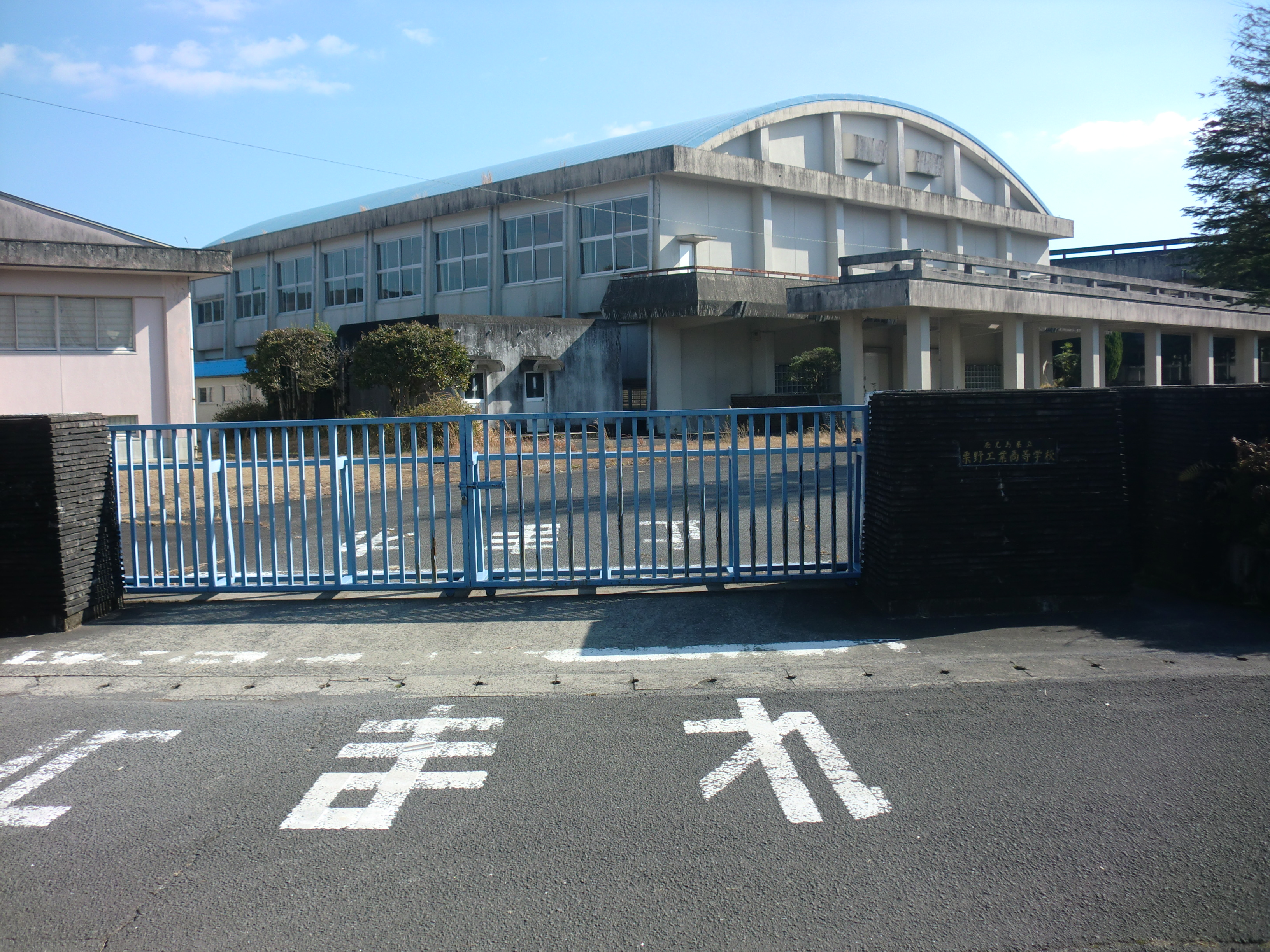 湧水町にある鹿児島県立栗野工業高等学校